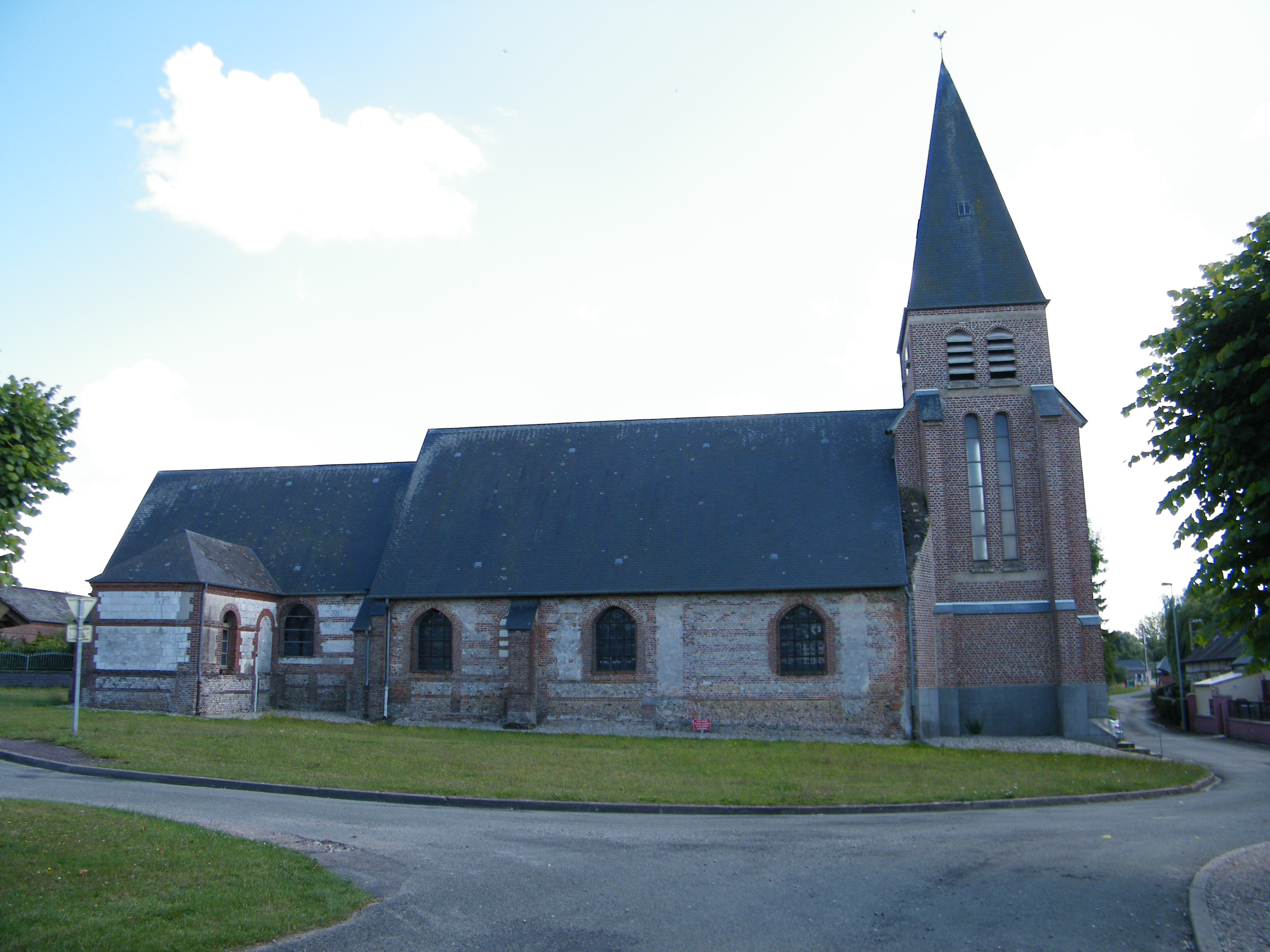 Fallencourt, Seine-Maritime, France, église